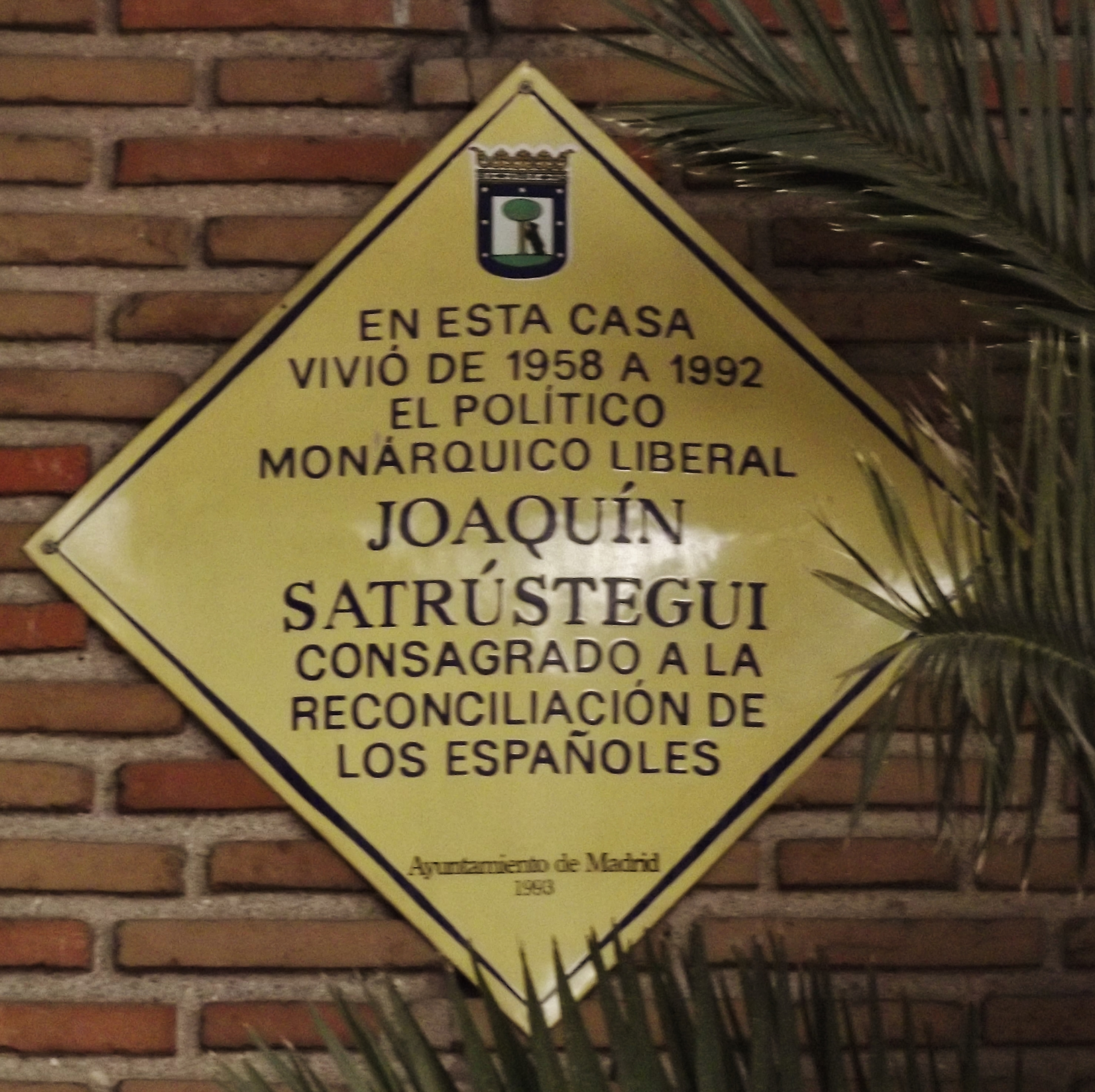 En esta casa vivió de 1958 a 1992 elpolítico monárquico liberal Joaquín Satrústegui consagrado a la reconciliación de los españoles.